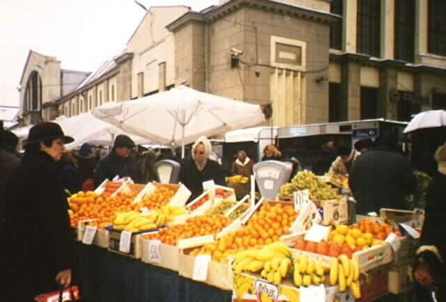 Foto: Einarspetz